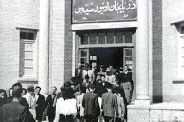 آذربایجان اونیورسیتی‌سی (دانشگاه آذربایجان)، یا دانشگاه تبریز کنونی در زمان حکومت خودمختار آذربایجان.